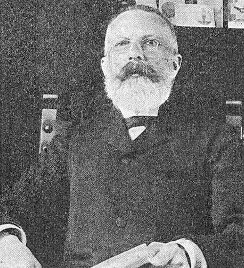 Fotografía de Augusto Arcimis (1844-1910)